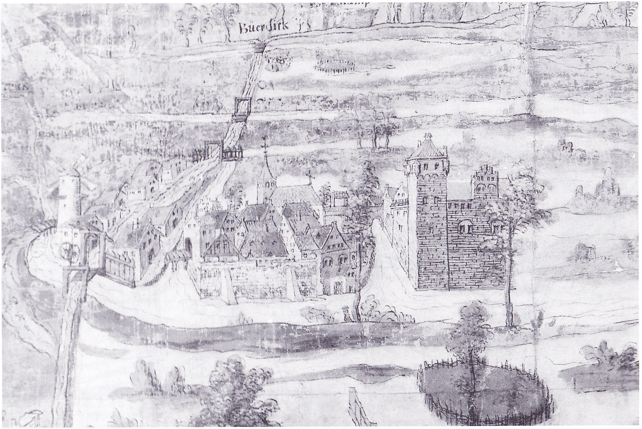 Ort Werth Westfalen Wasserkarte 16 Jhd